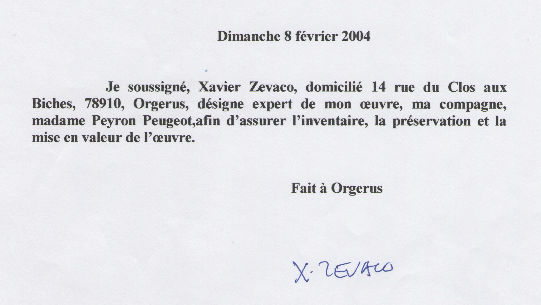 Xavier Zevaco désigne Christiane Peugeot comme experte de son oeuvre